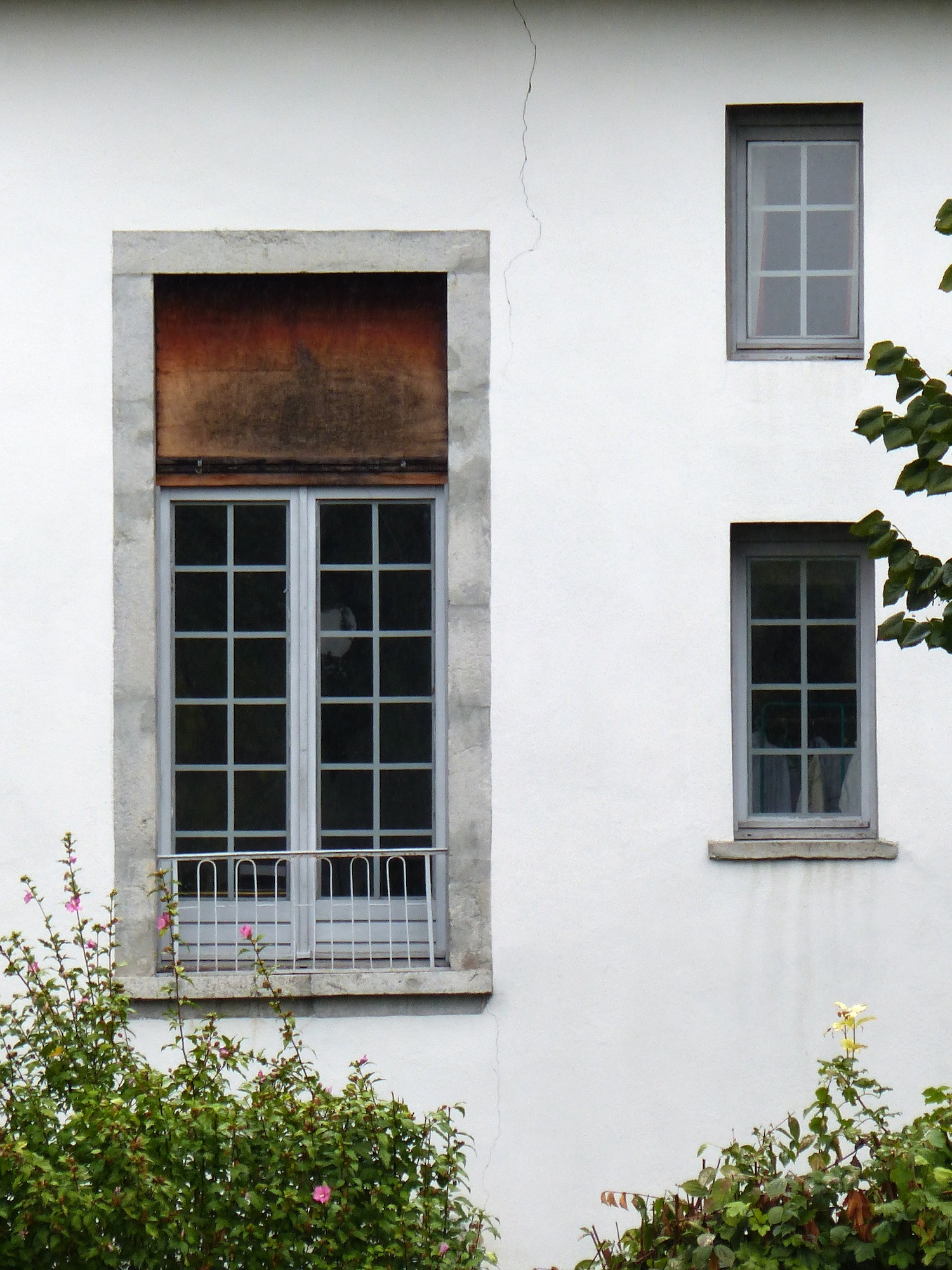 Ouvertures du logis de l'ancienne abbaye des Ayes à Crolles (38)